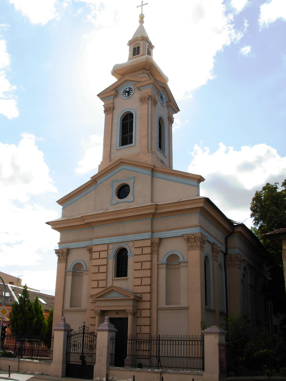 Evangelistička crkva u Novom Sadu, na uglu Masarikove i ulice Jovana Subotića.